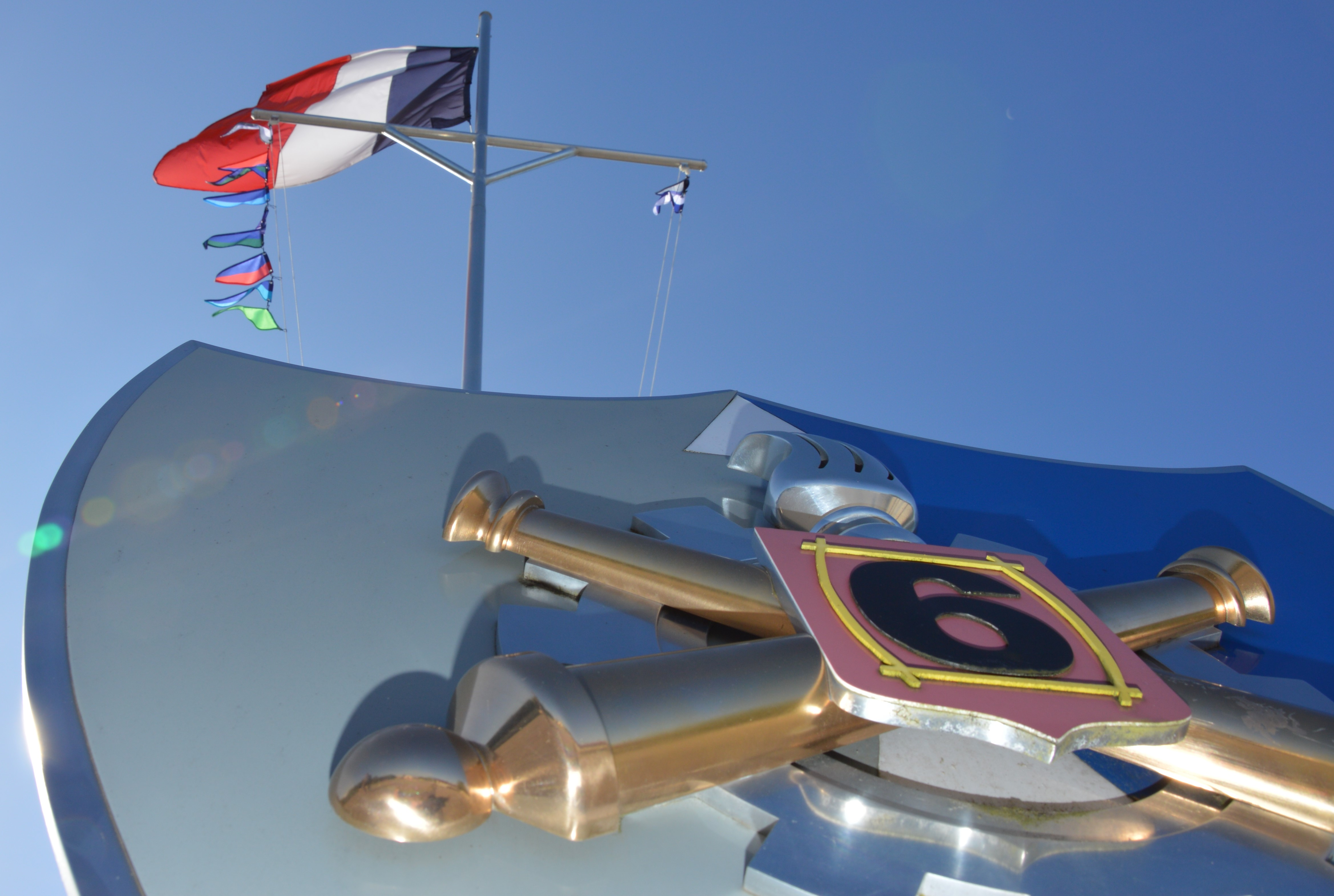 Coupe drapeau 6e régiment du matériel